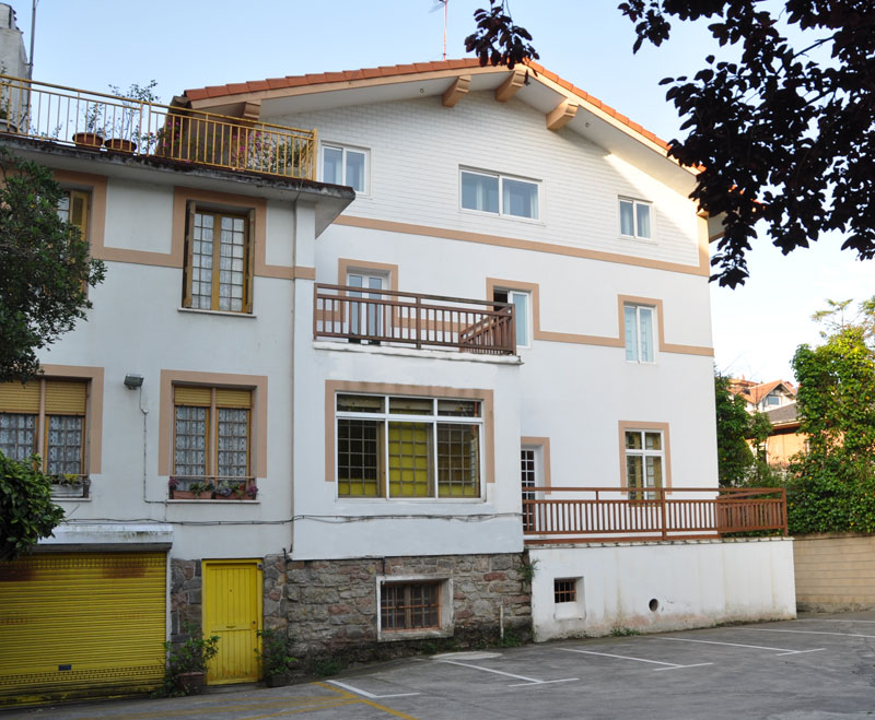 Berritzegunea Donostian